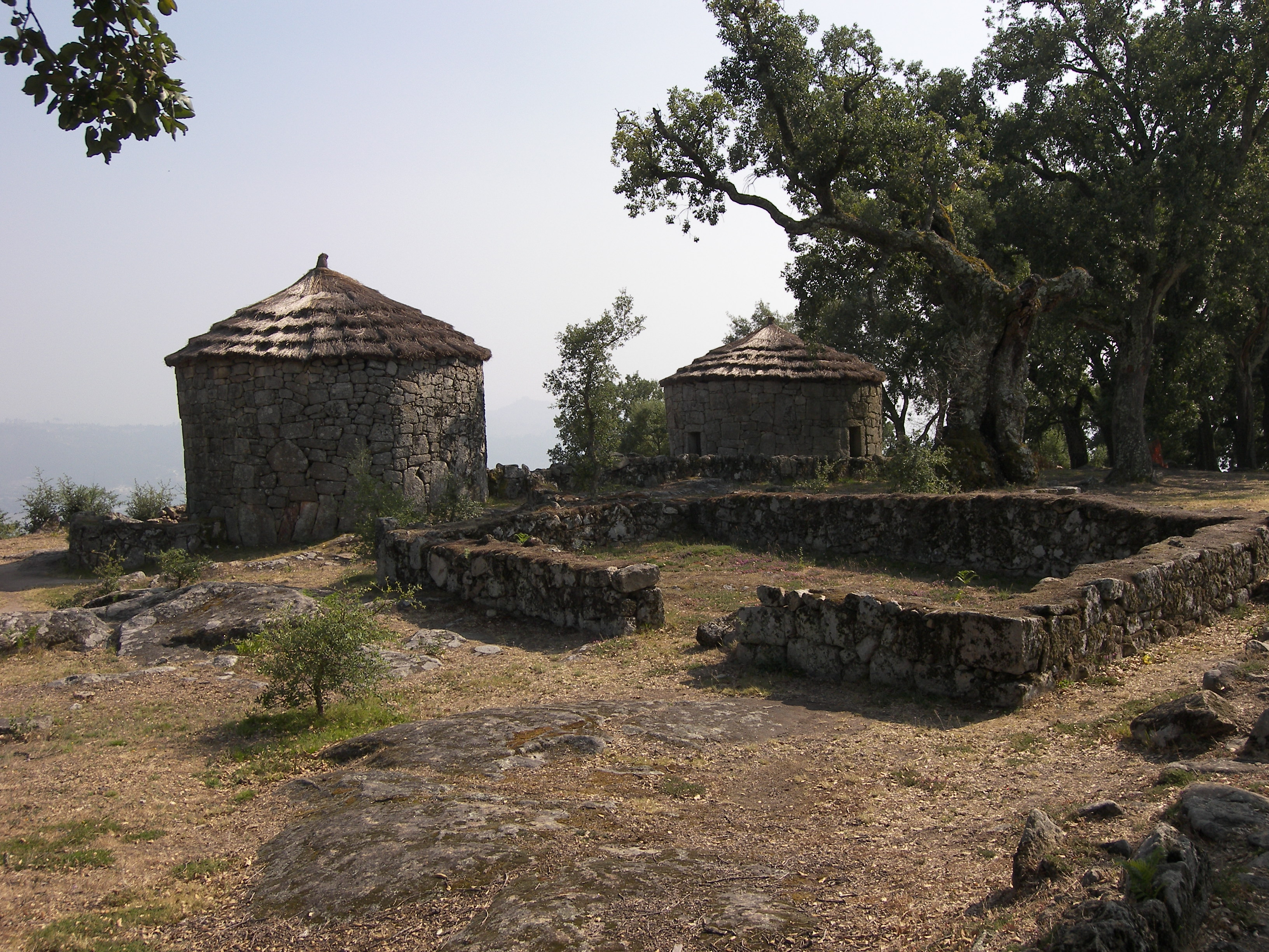 Citânia de Briteiros: Restaurierte Häuser